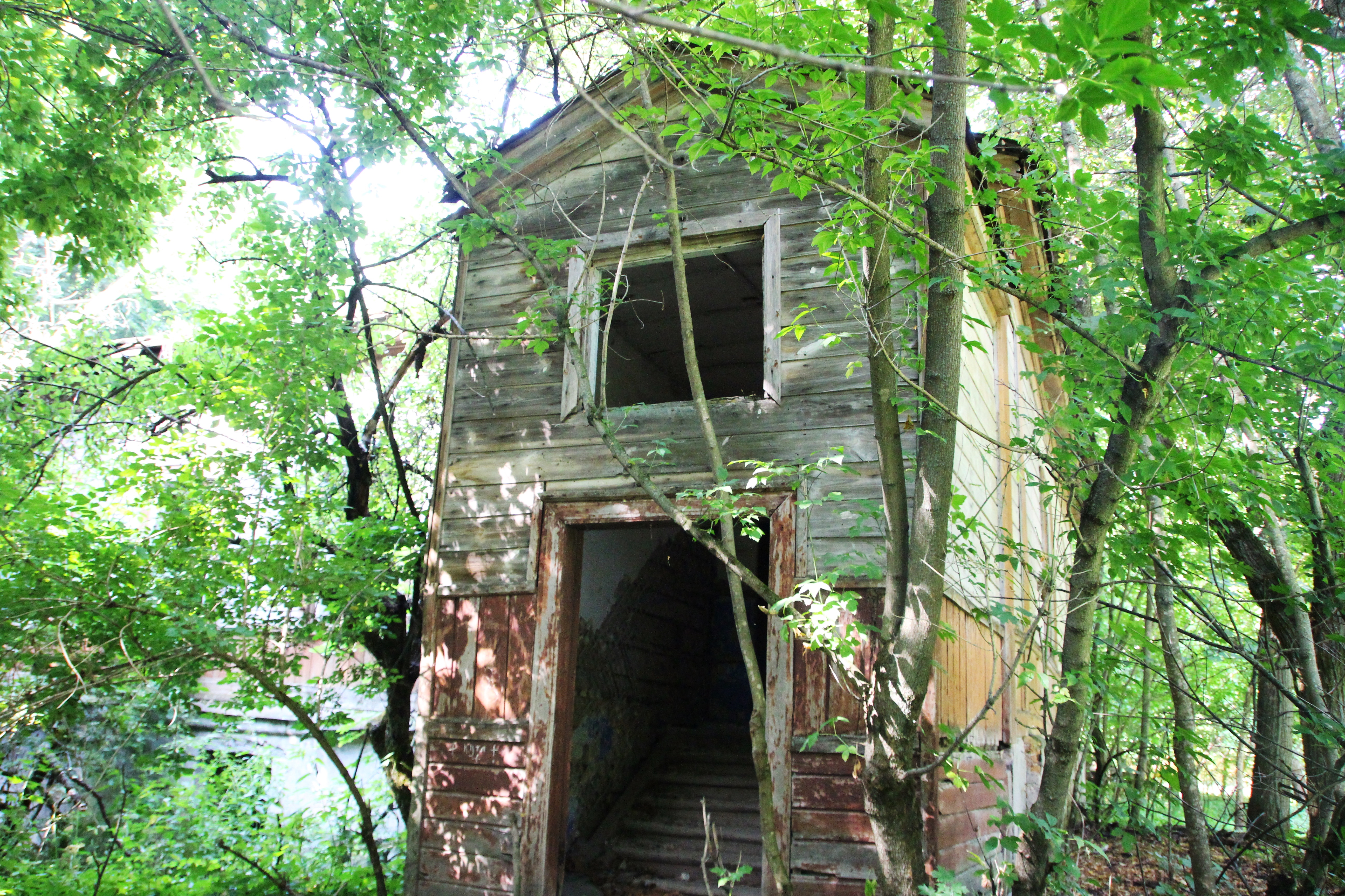 Флігель садиби Кочубеїв (мур.), село Ярославець, вул. Перемоги, 13